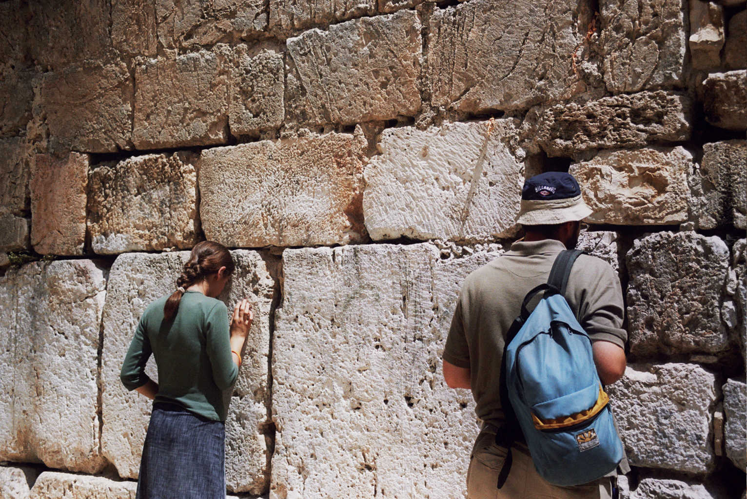 העיר העתיקה בירושלים (בערבית: بلدة القدس القديمة, נהגה: בִּלִדַת אֶלקוּדְס אֶלקָדִימָה) היא האזור העירוני העתיק של ירושלים. שטחה המוקף על ידי חומות ירושלים הוא כ-850 דונם.כמו כן נכללים בעיר העתיקה הר ציון ועיר דוד, הנמצאים מחוץ לחומות, בסמוך ומצד דרום. העיר העתיקה מהווה מוקד משיכה מרכזי לתיירים בני דתות ואומות שונות, אשר באים מרחבי העולם לבקר את האתרים הקדושים הנמצאים בה, ובהם: הר הבית, הכותל המערבי וכנסיית הקבר.